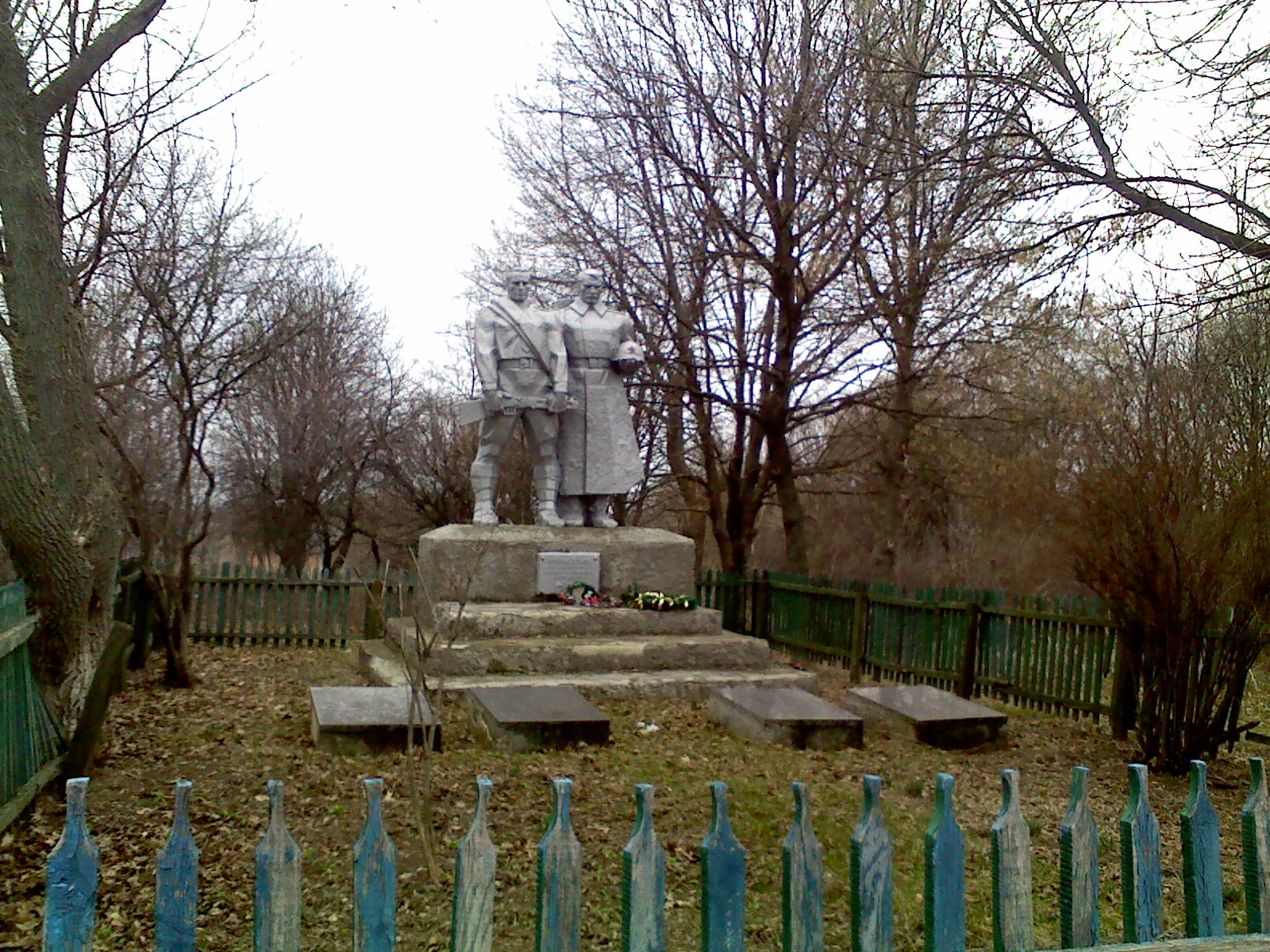 Братське захоронення с. Мошоріно Знам'янського району Кіровоградської області.